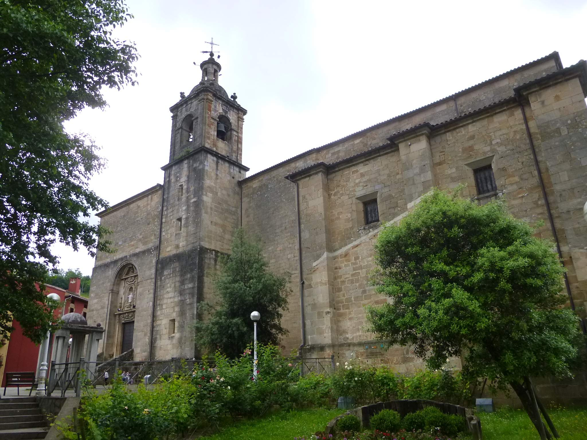 Zegama (Gipuzkoa) - Iglesia de San Martín de Tours